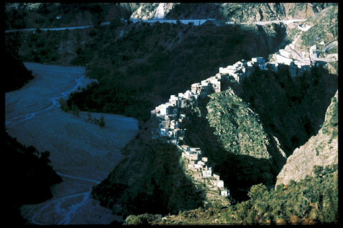 Paesino unico su un costone di roccia, abbandonato dopo le alluvioni. Ci sarà ancora? Autore: Giuseppe De Marte Anno: 1973